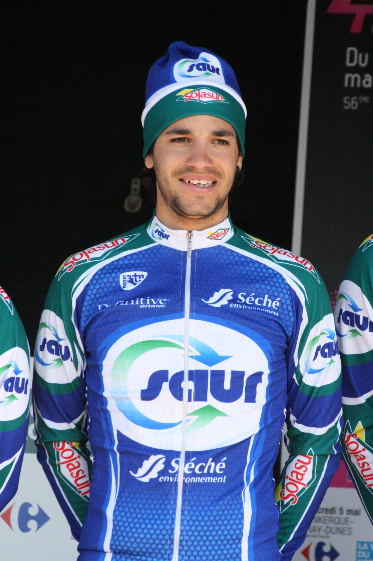 Jérémie Galland lors de la présentation des équipes des 4 jours de Dunkerque 2010